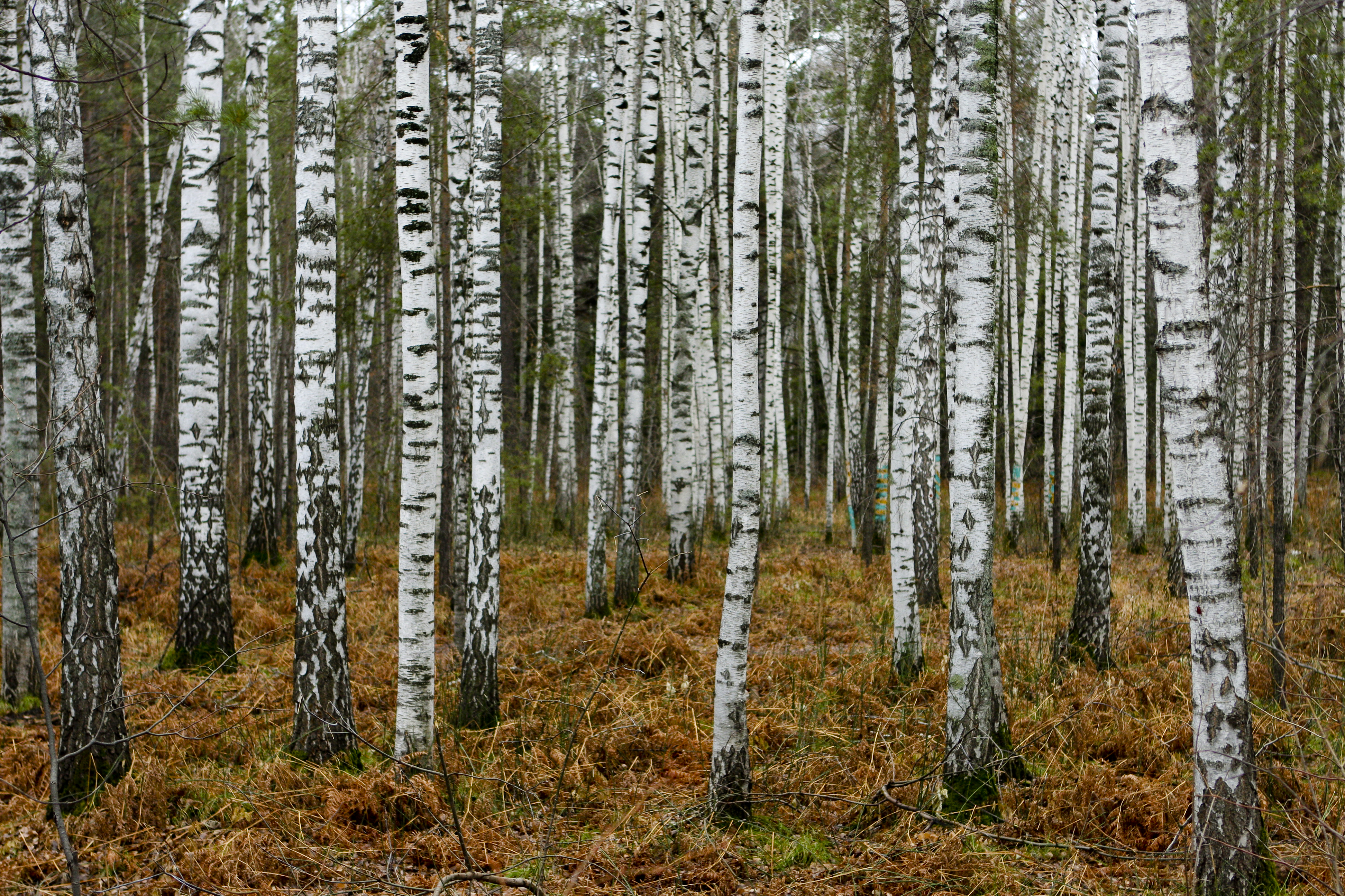 Siberian forest. Novosibirsk, Russia, November 2008